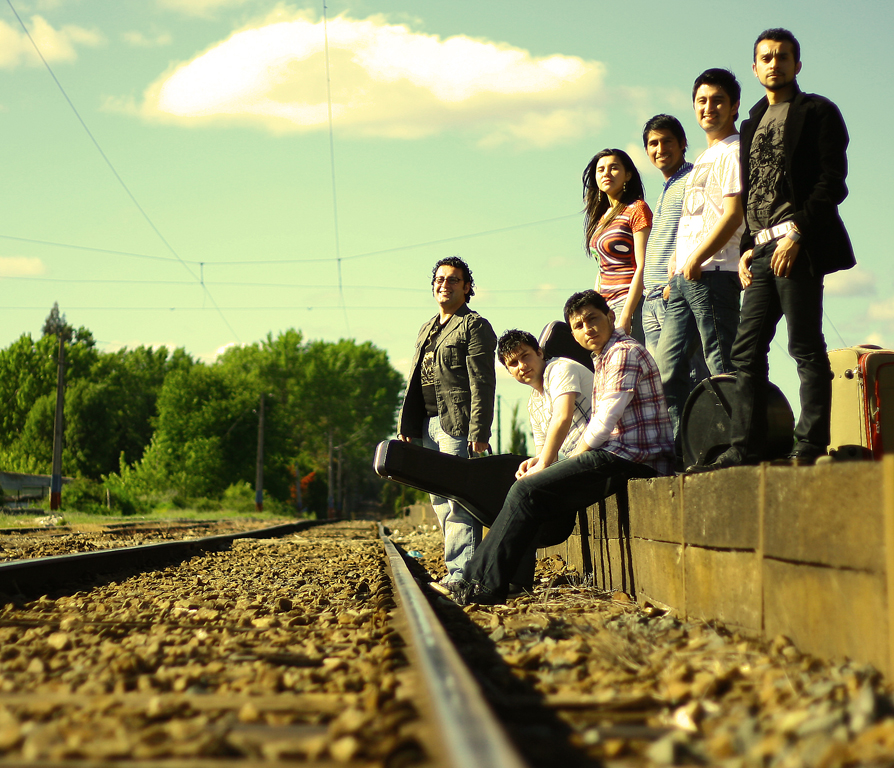 Foto de sesión de KyriosBand para su tercer disco, Amigo.